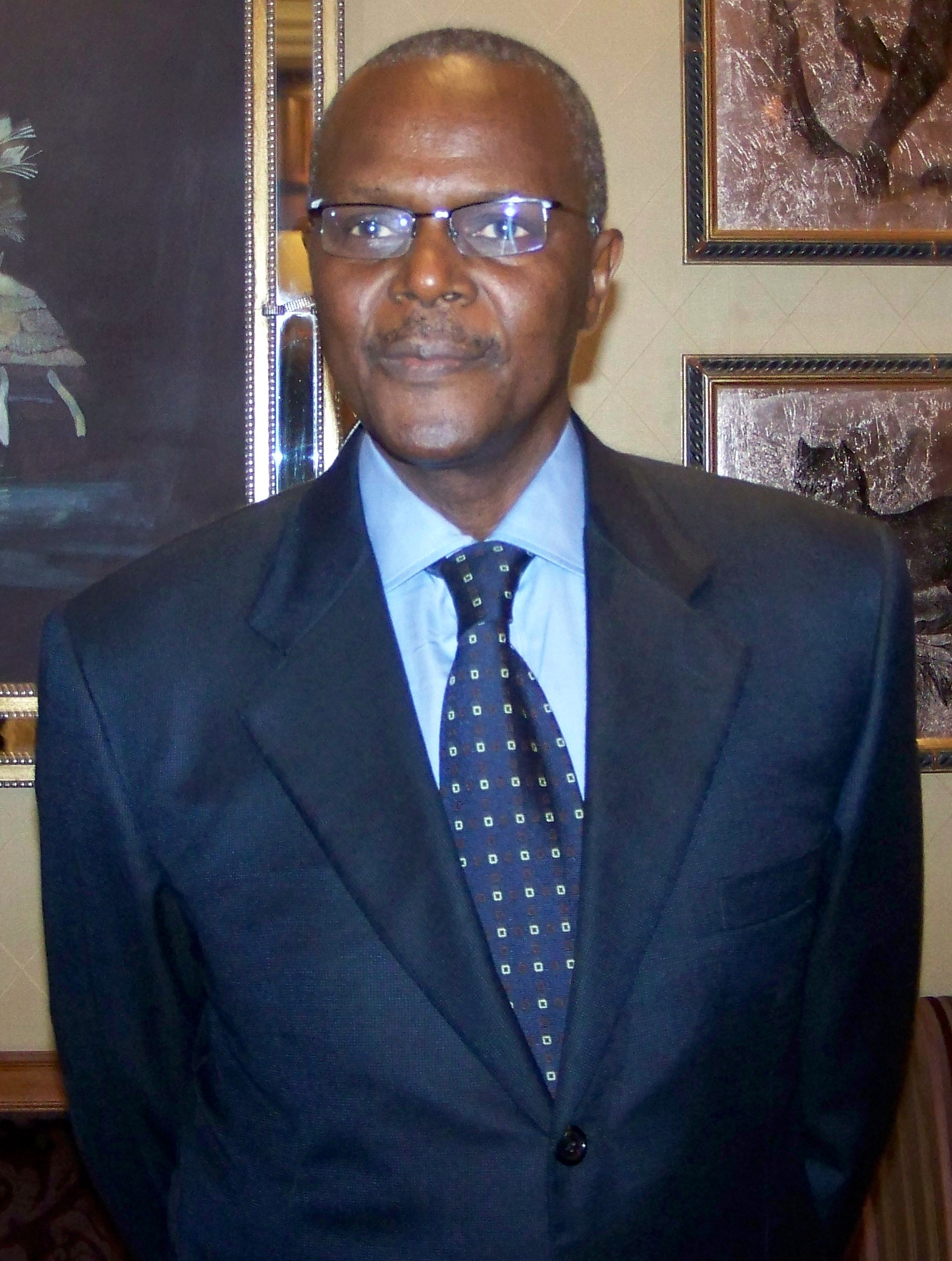 Ousmane Tanor Dieng Parti Socialiste senegal 2008